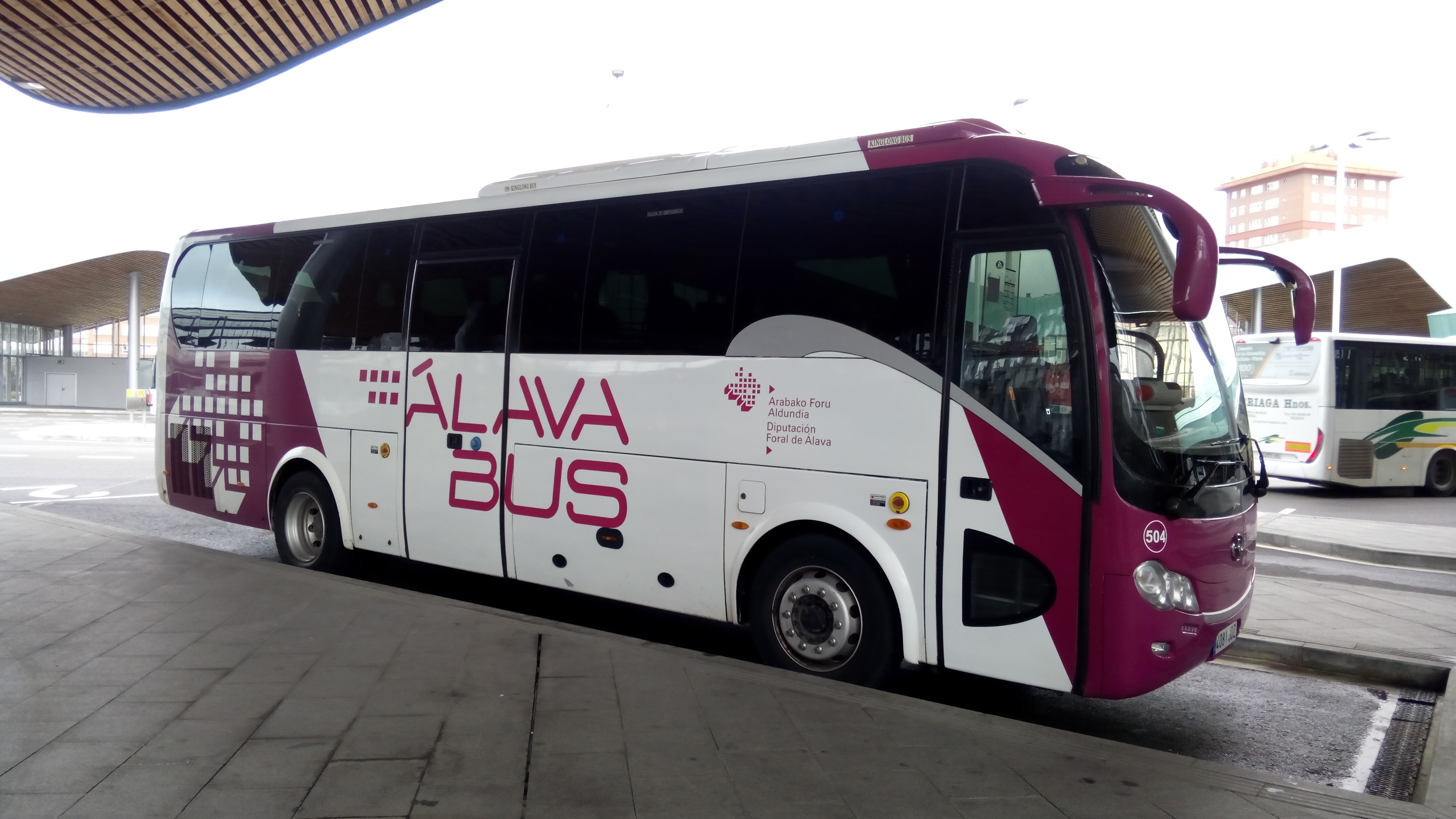 ÁlavaBus Líneas Regulares de Álava